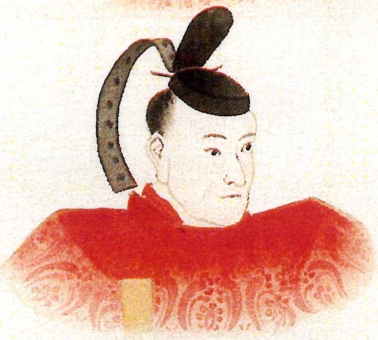 板倉勝職の肖像。